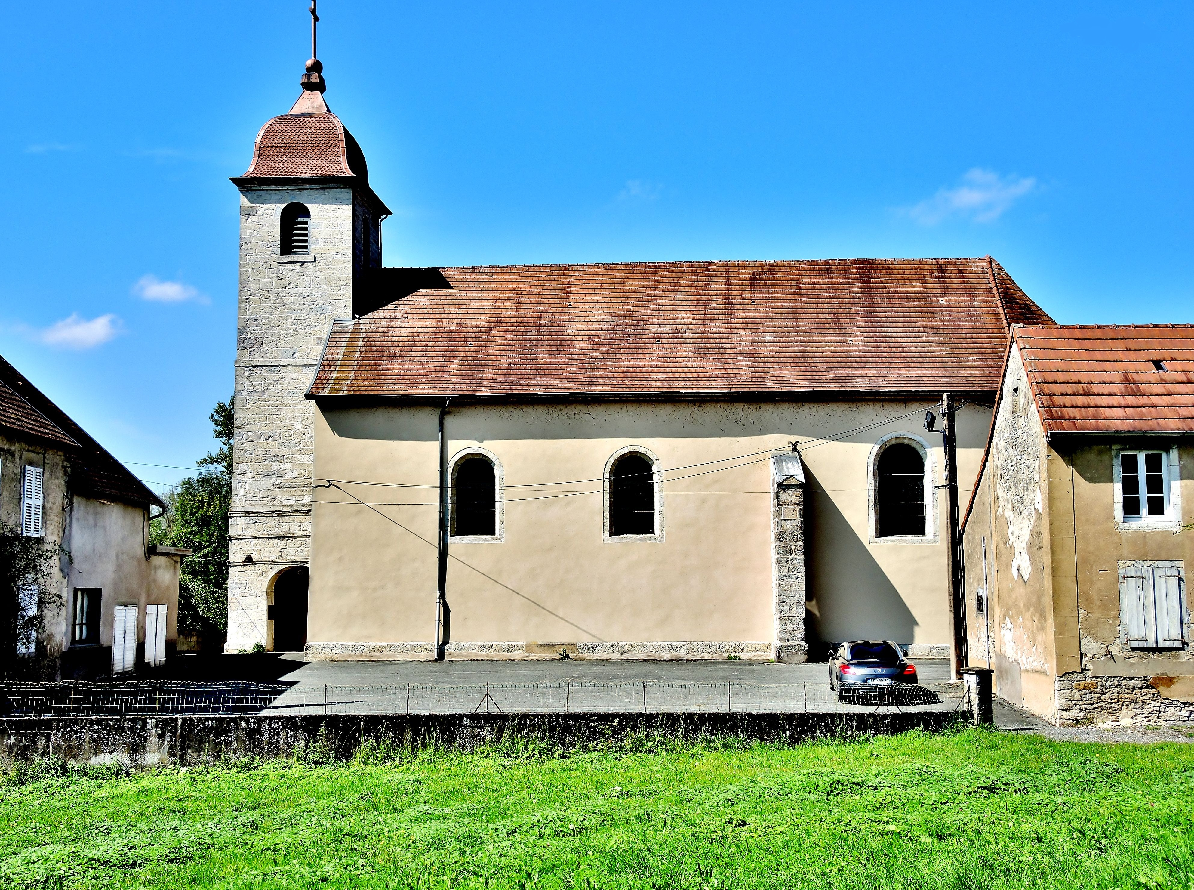 Eglise du village de Rang. Doubs